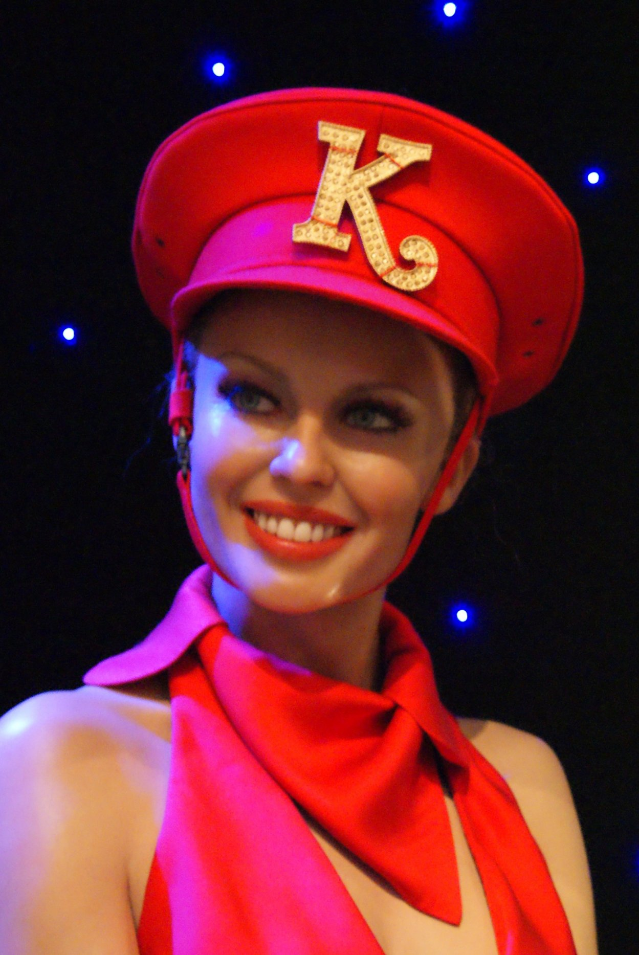 Estatua de cera de Kylie Minogue en Madame Tussauds (London or where?)